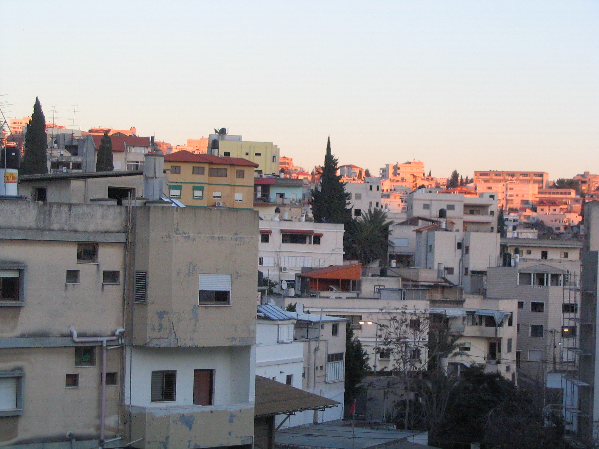 Město Nazareth na Západním břehu Jordánu na území Palestinské autonomie